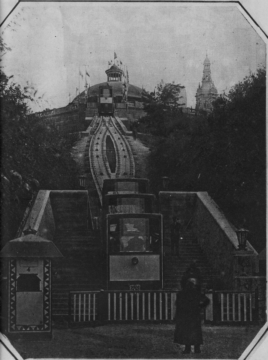 Funicular per pujar al Palau Nacional (Montjuïc) durant l'Exposició Universal de Barcelona-1929 (Catalunya).